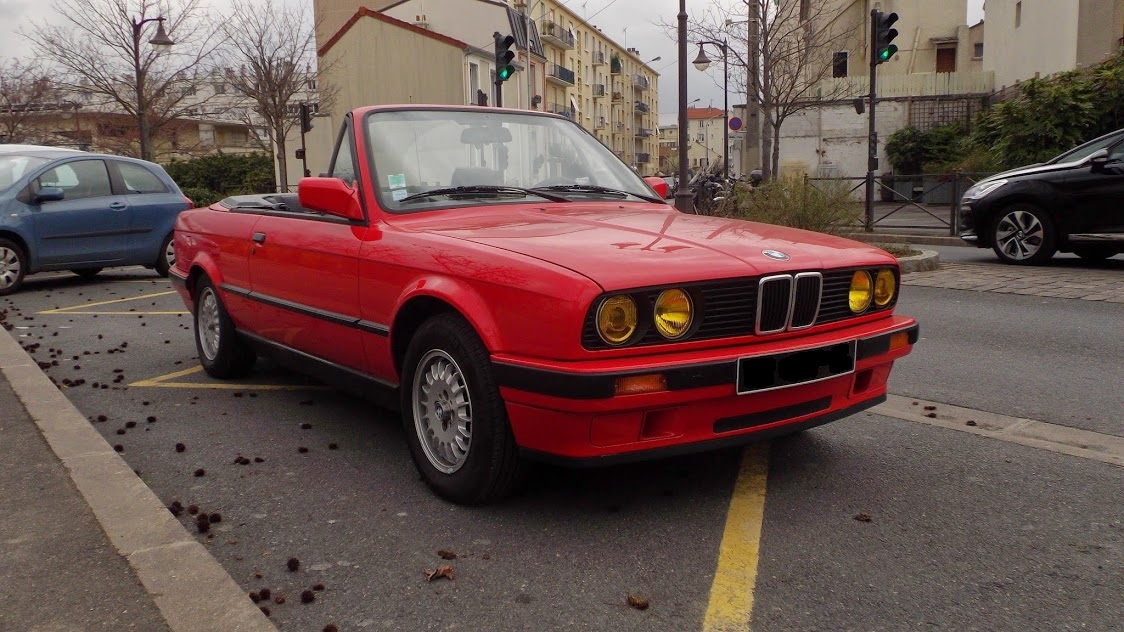 BMW E30 Cabriolet Brillantrot 318i